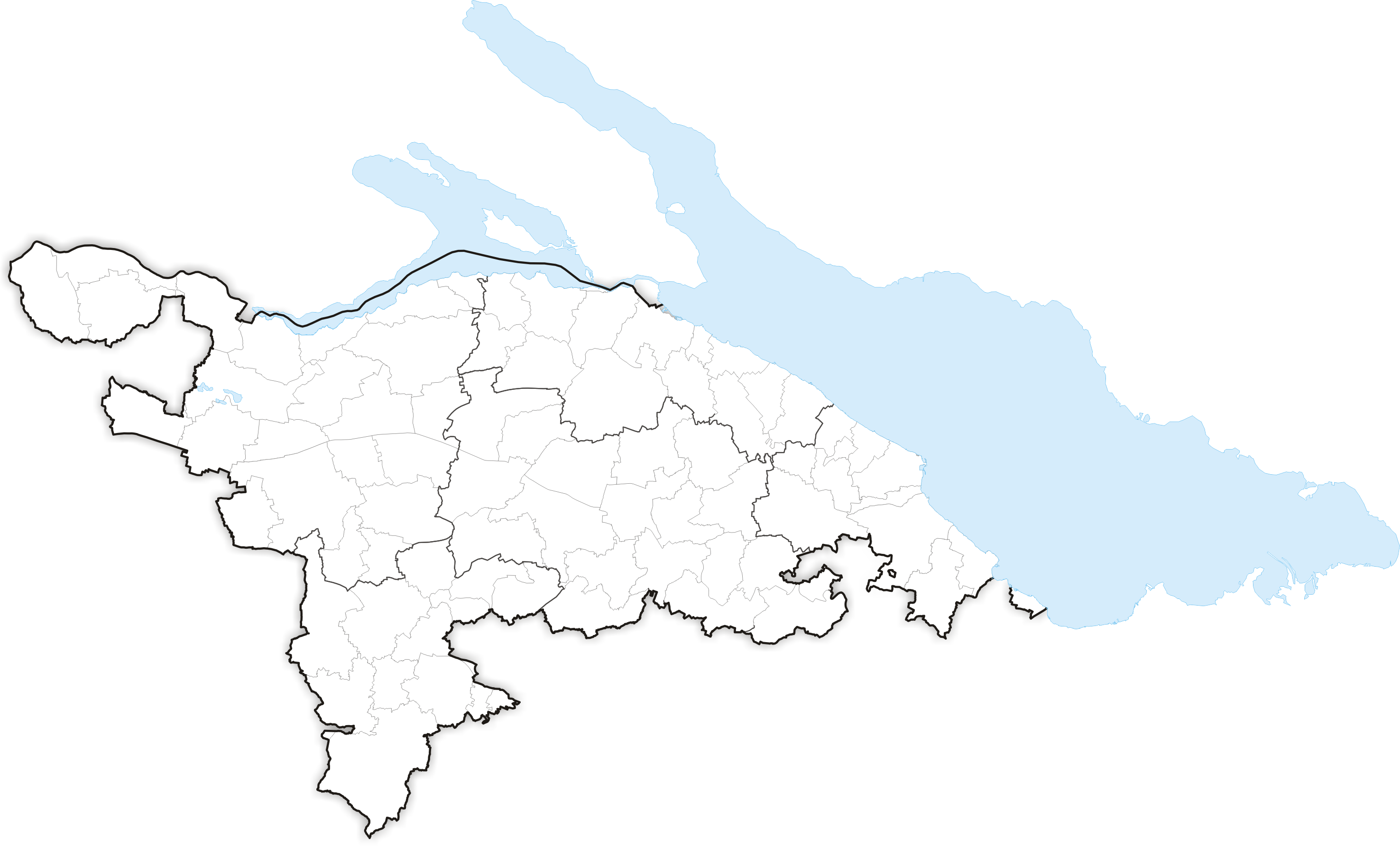 Municipalities in Canton Thurgau 2011/ Gemeinden des Kantons Thurgau ab 2011